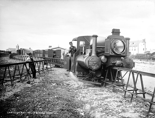 ca. 1890 in Ballybunnion, Kerry, Irland aufgenommen.